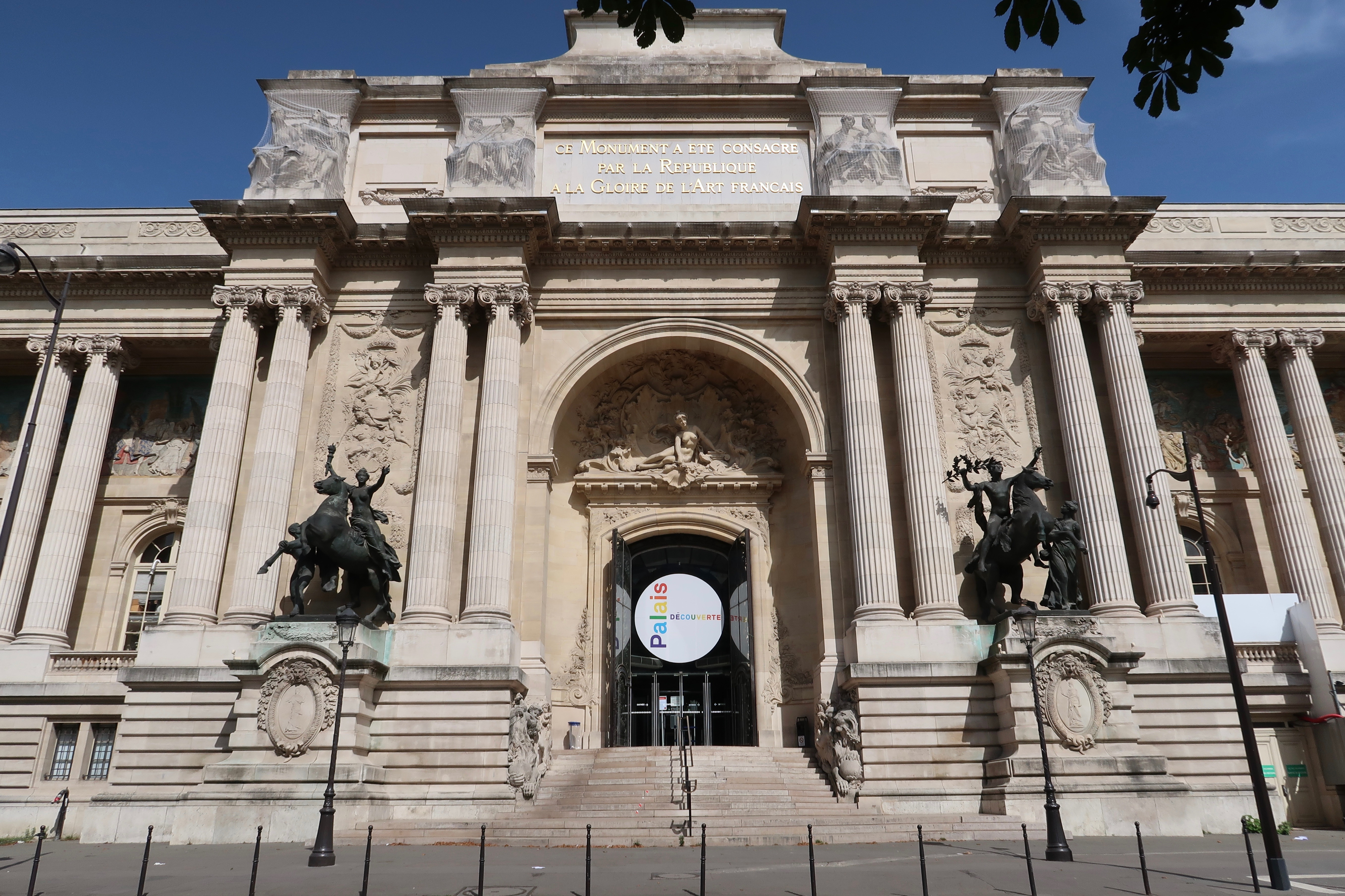 Palais de la découverte, avenue Franklin-Delano-Roosevelt (Paris 8e).